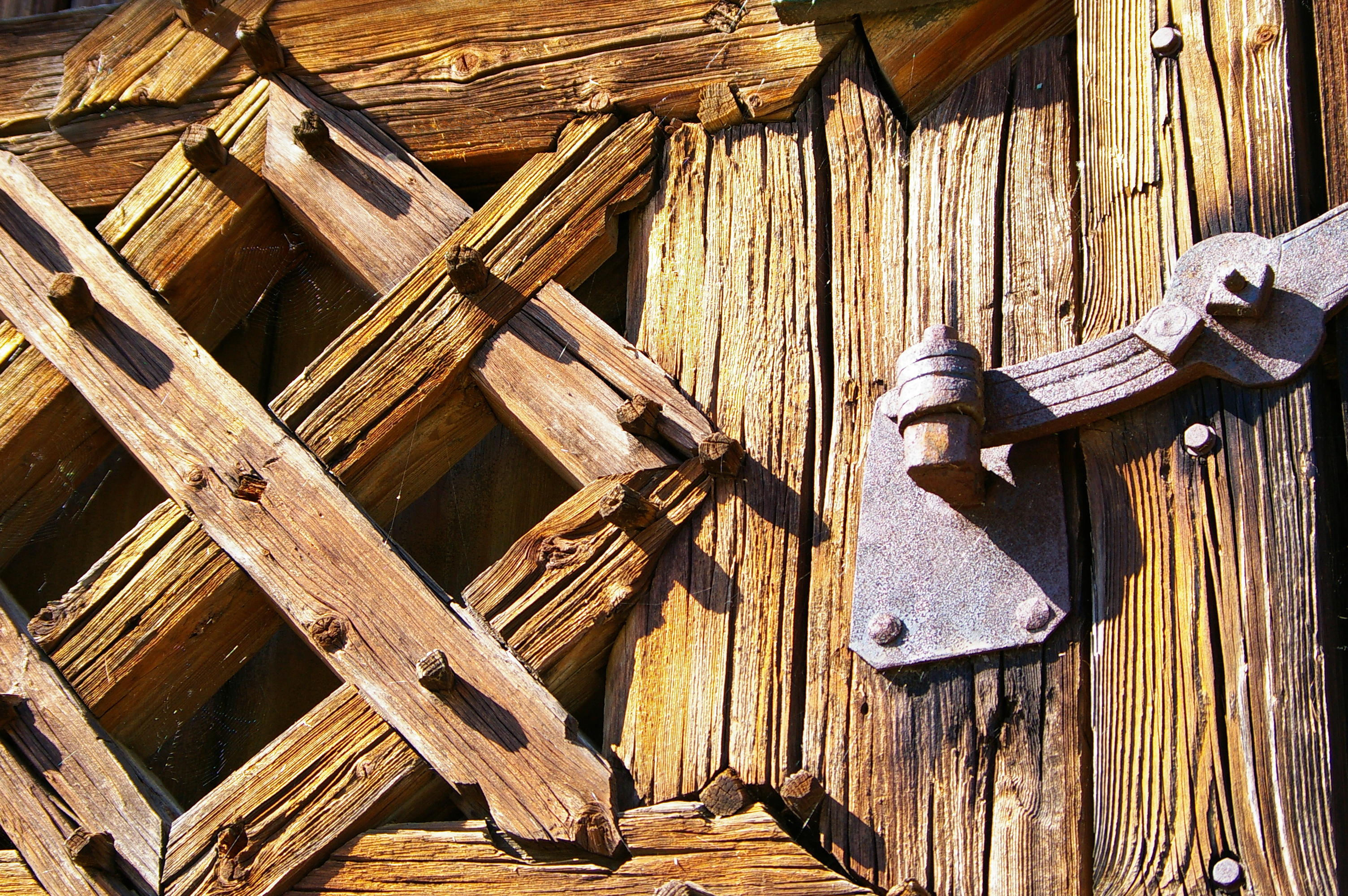 farm stable in upper Austria (Haigermoos)